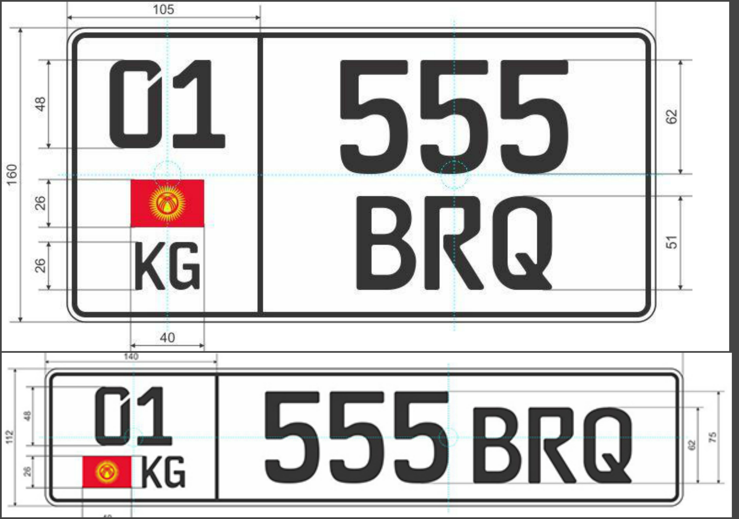 Кыргызча: Жаңы авто номерлер